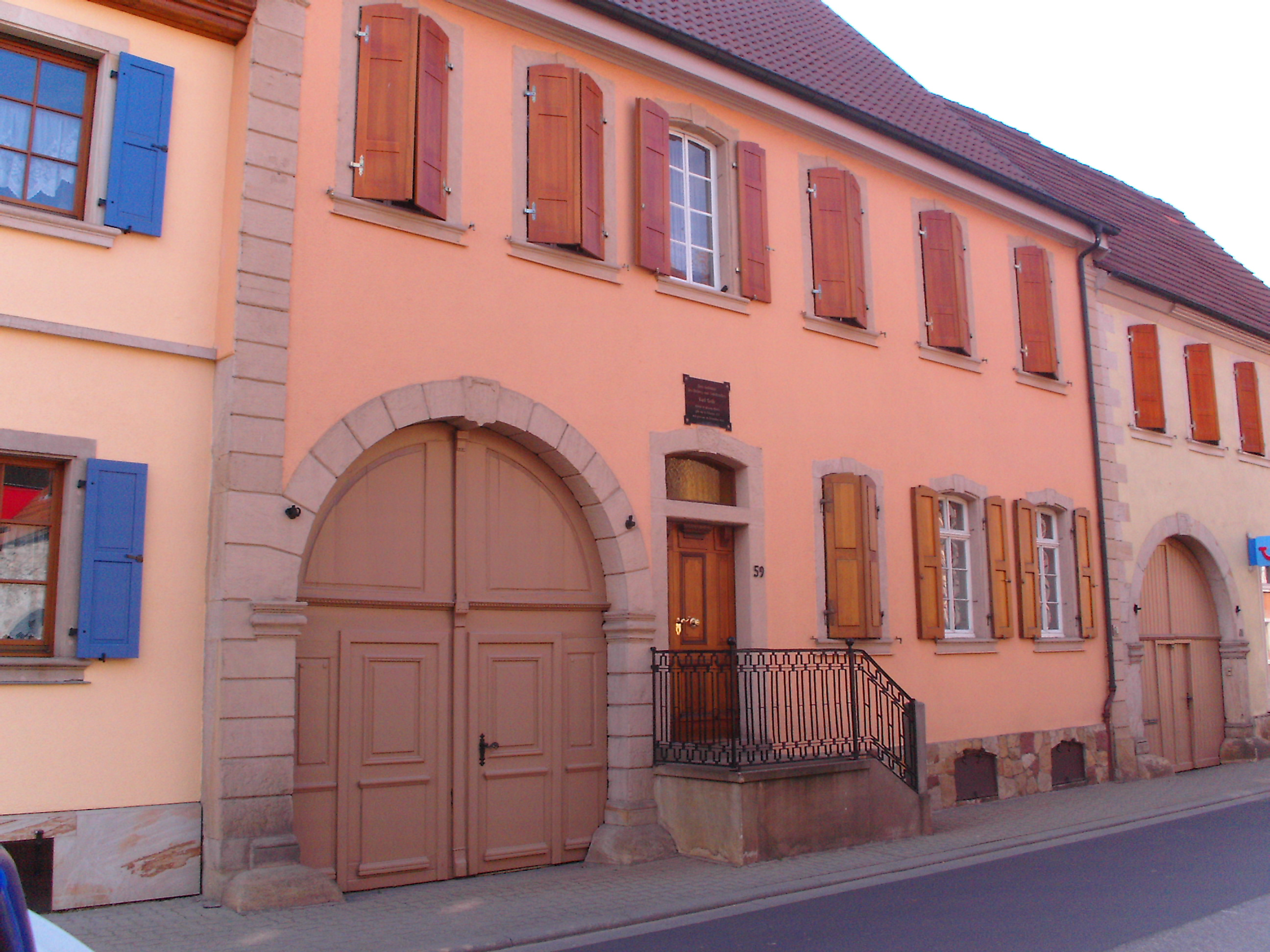 67245 Lambsheim, Pfalz, Deutschland, Hauptstraße, Geburtshaus von Karl Geib